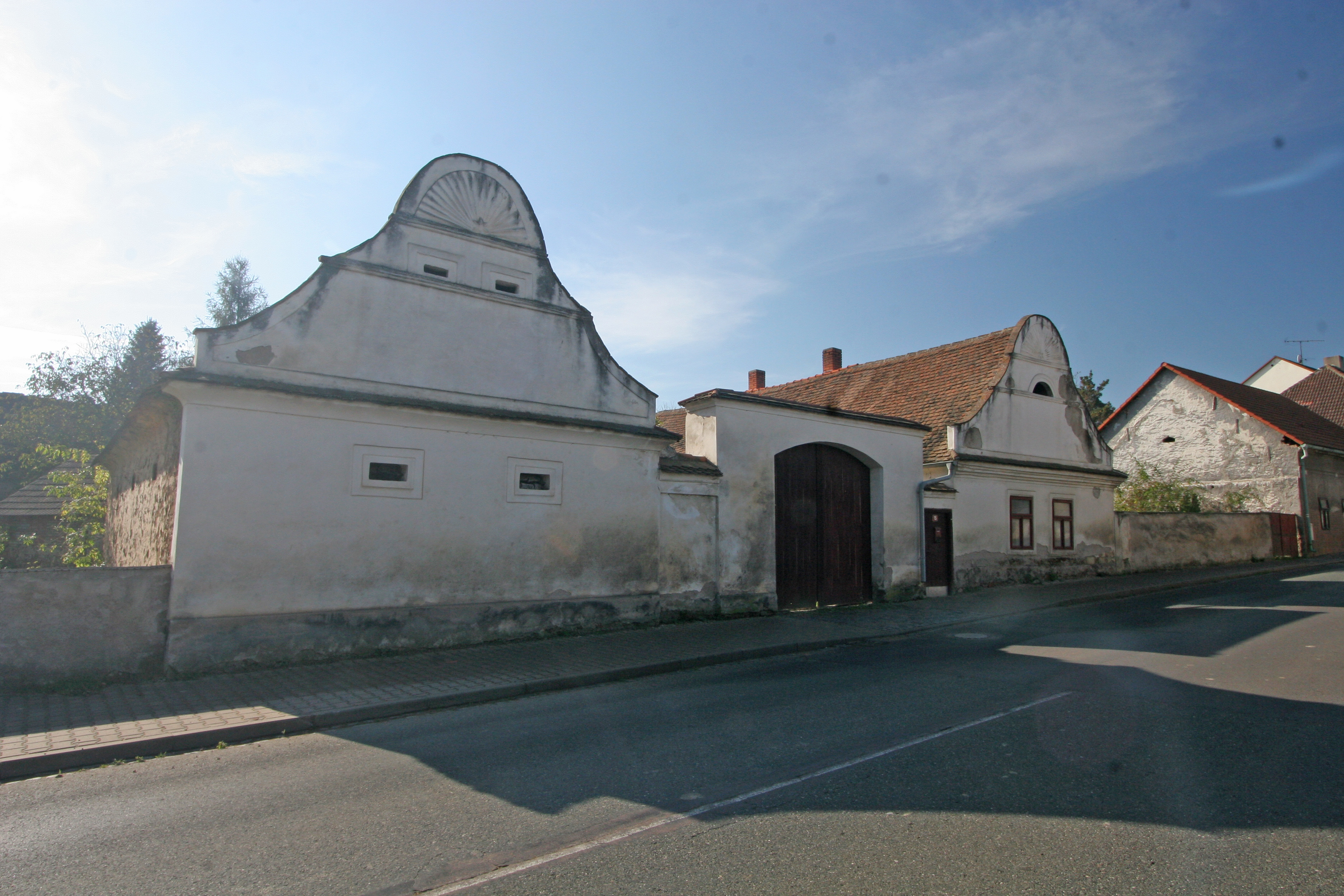 Venkovská usedlost (Zdechovice), Zdechovice 15